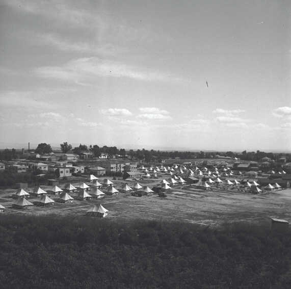 מחנה צבאי ברמת-דוד